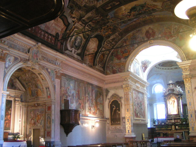 Interno della Chiesa di San Rocco a Lugnao